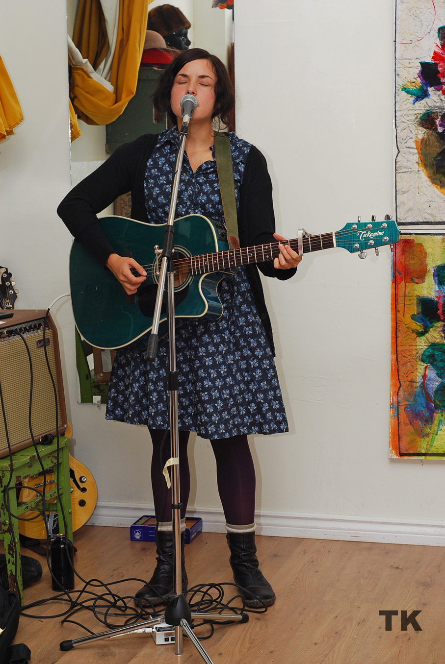 Singer Abigail Lapell